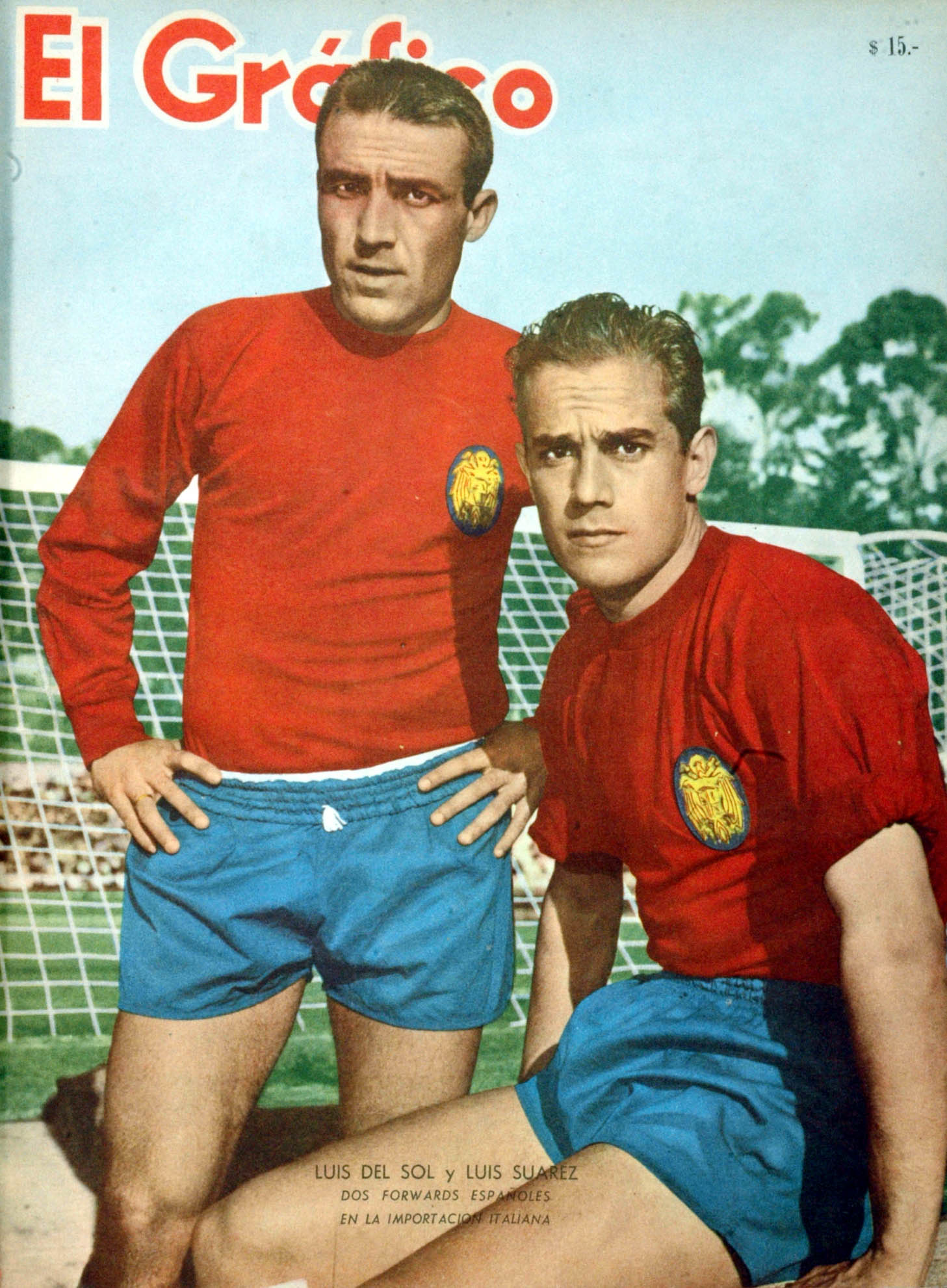 El Grafico del 04 de Julio de 1962. Edicion 2230